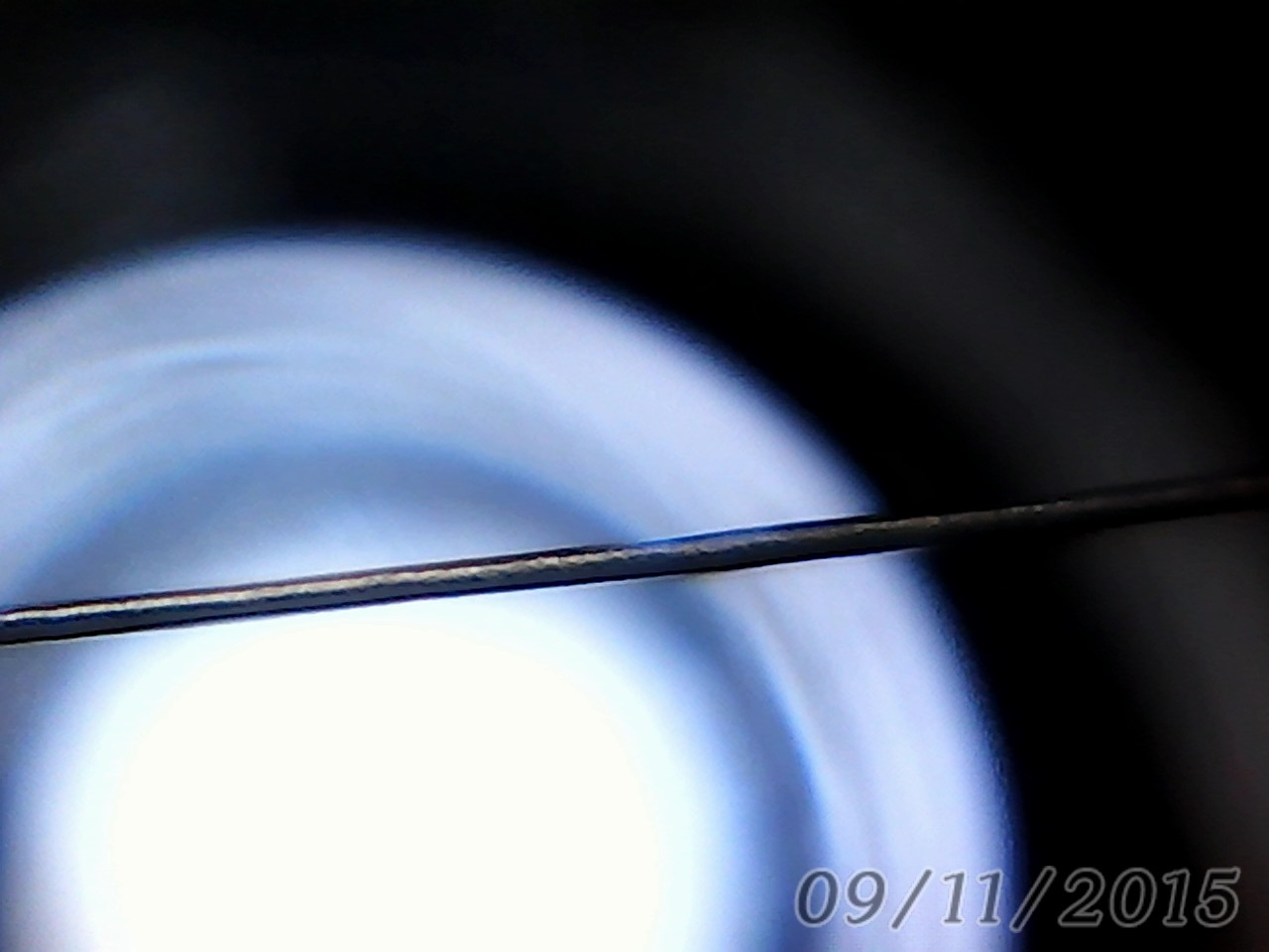 Es un pelo o cabello ampliado con un microscopio